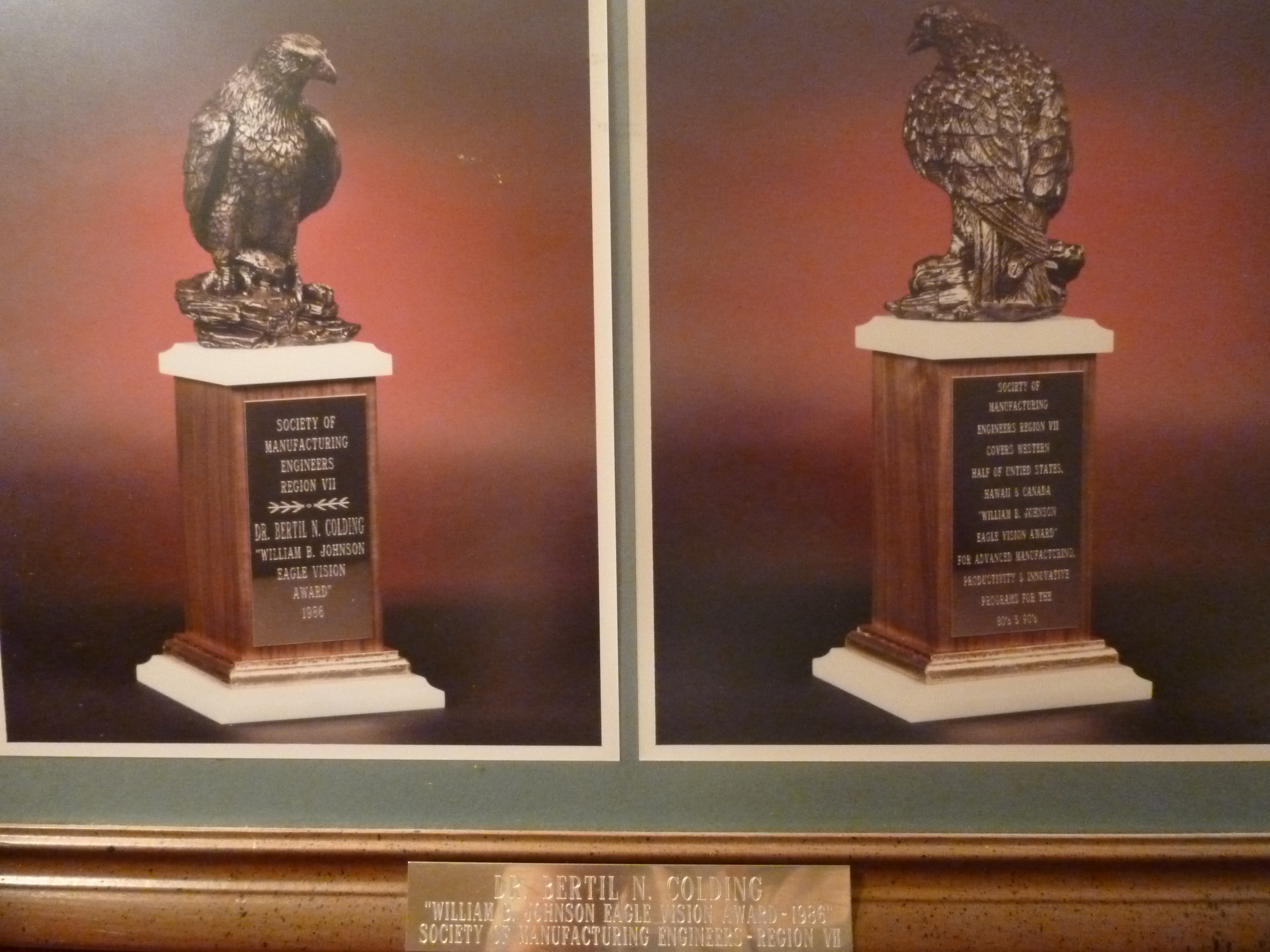 William B. Johnson Eagle Vision Award 1986